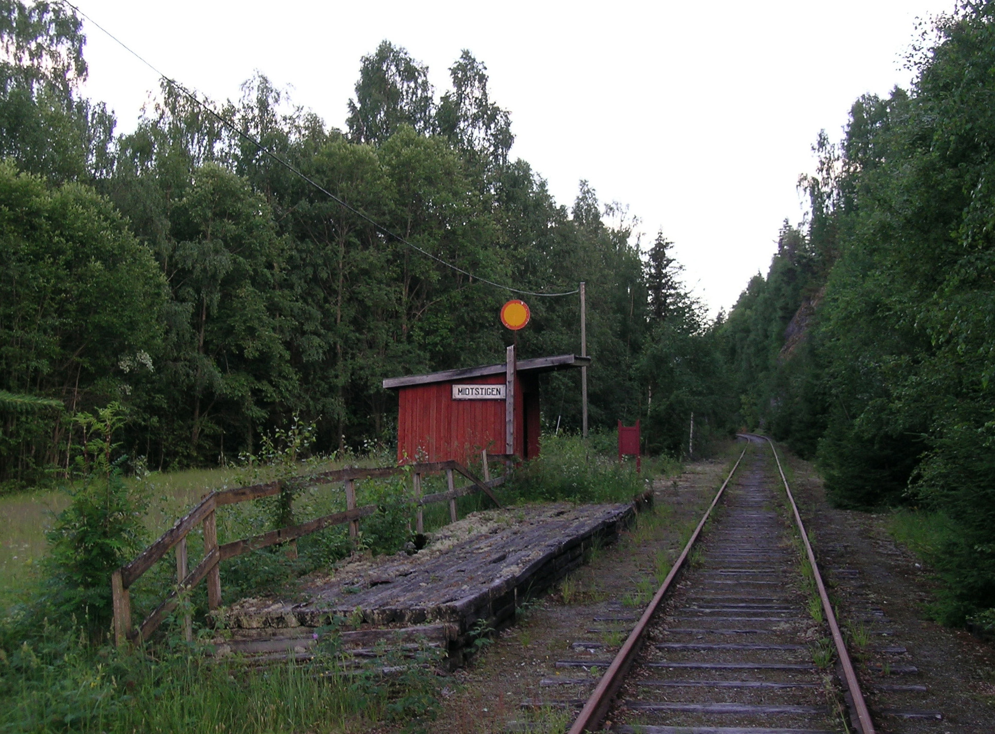 Numedalsbanen. Midtstigen holdeplass i Nore.